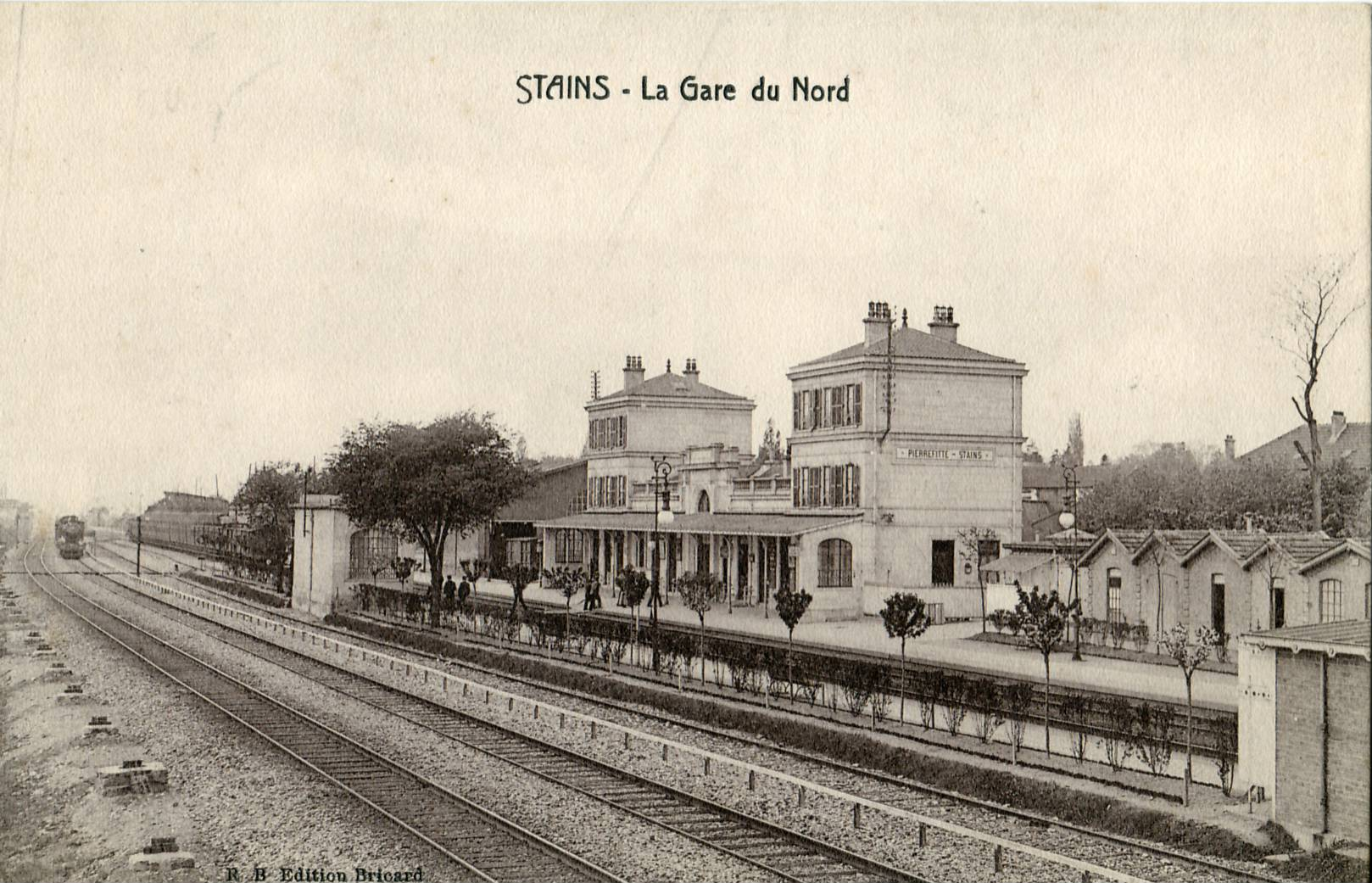 Carte postale ancienne éditée par Bricard PIERREFITTE et STAINS : La gare du Nord (aujourd'hui Station RER de Pierrefitte - Stains)